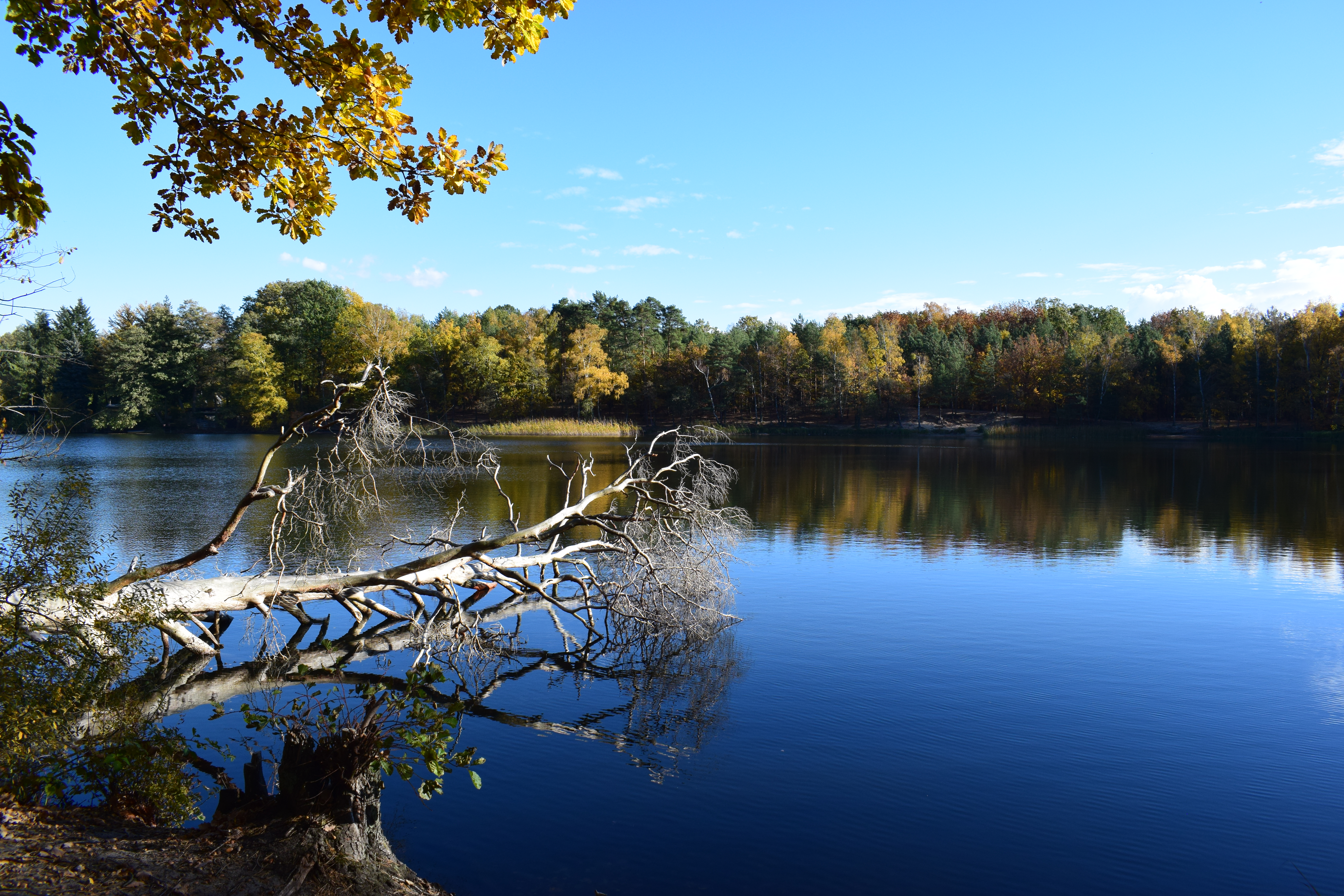 Kleiner Lienewitzsee bei Michendorf, Brandenburg.